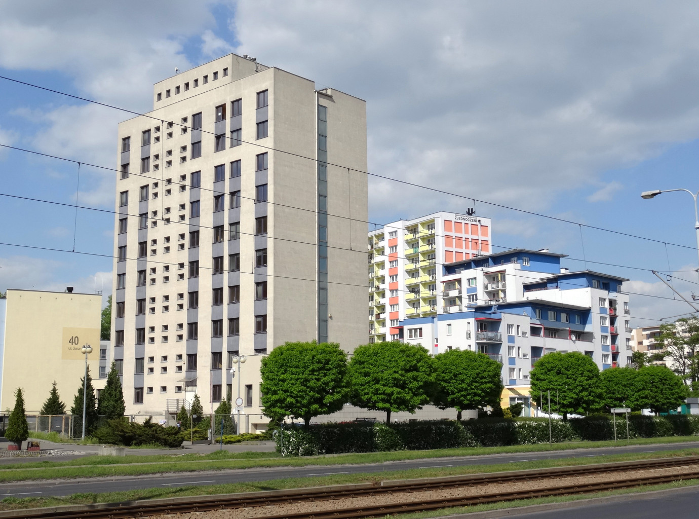 Pierwszy Urząd Skarbowy przy ul. Fordońskiej 77 w Bydgoszczy